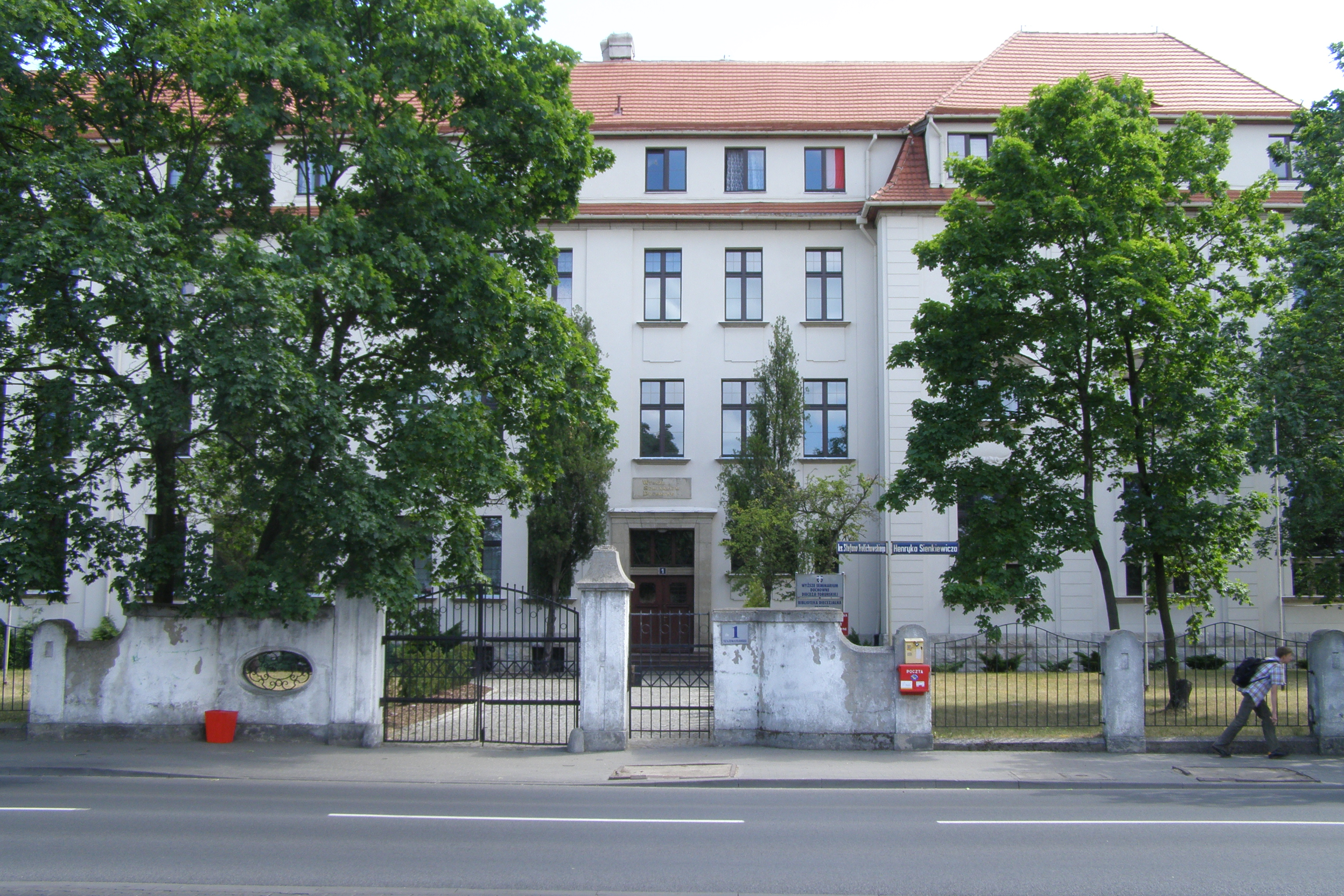 Widok na Wyższe Seminarium Duchowne Diecezji Toruńskiej